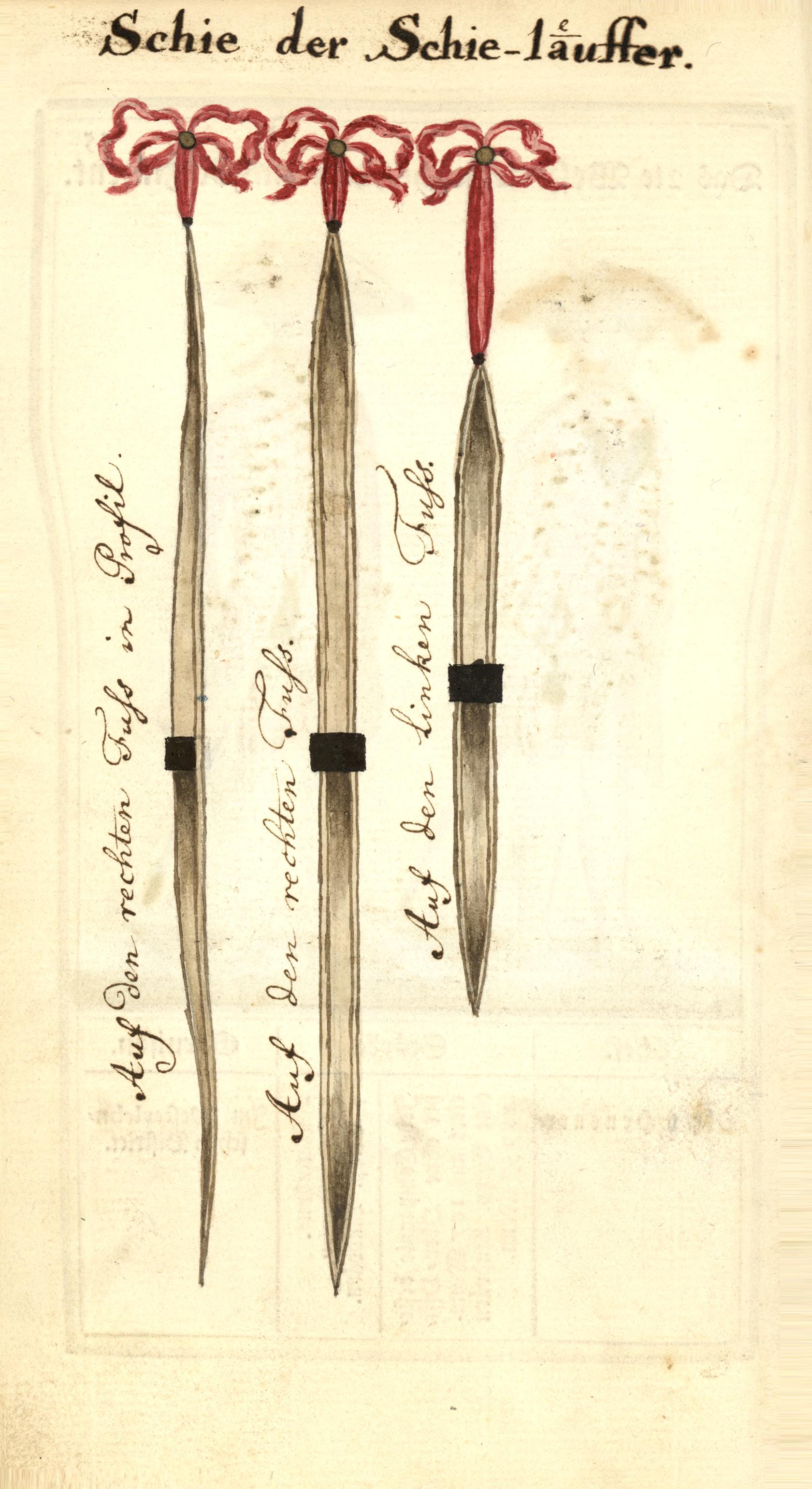 Illustrasjon hentet fra boken "Vorstellung der sämtlichen Königl. Dänischen Armee" av Bertram, Carl og utgitt av Carl Bertram (dk, 1763)